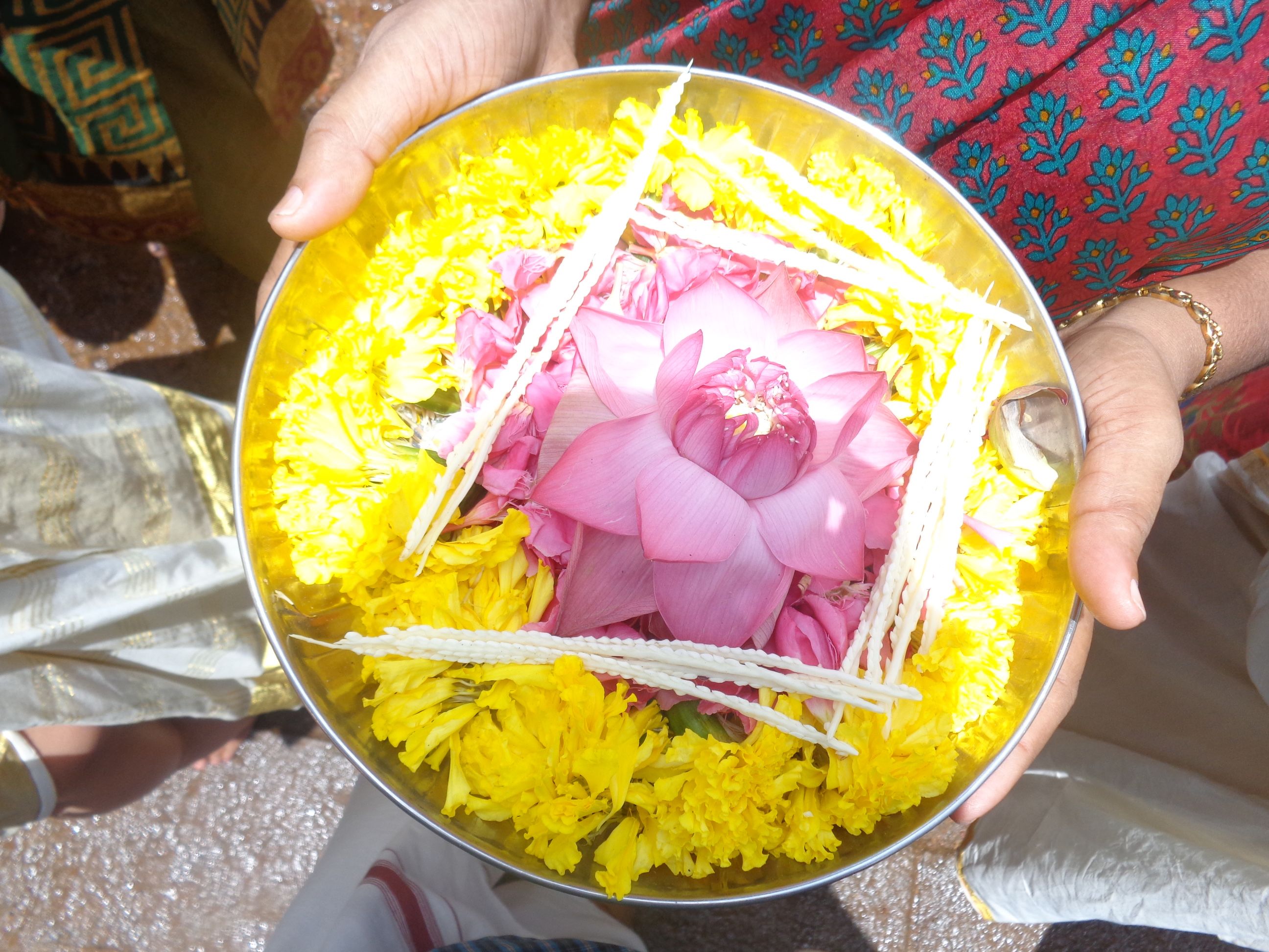 decorated plate , (thalam) welcoming boat people